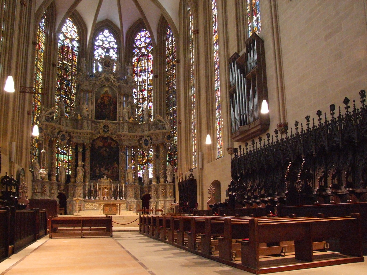 Erfurter Dom, Erfurt, Germany